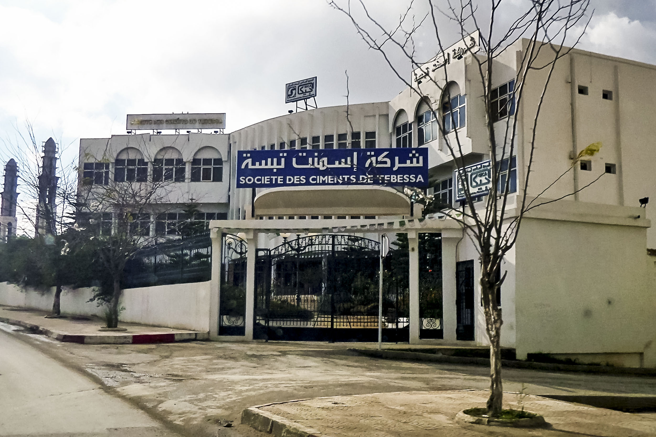 Wilaya de Tébessa ولاية تبسة Société des ciments de Tébessa شركة اسمنت تبسة